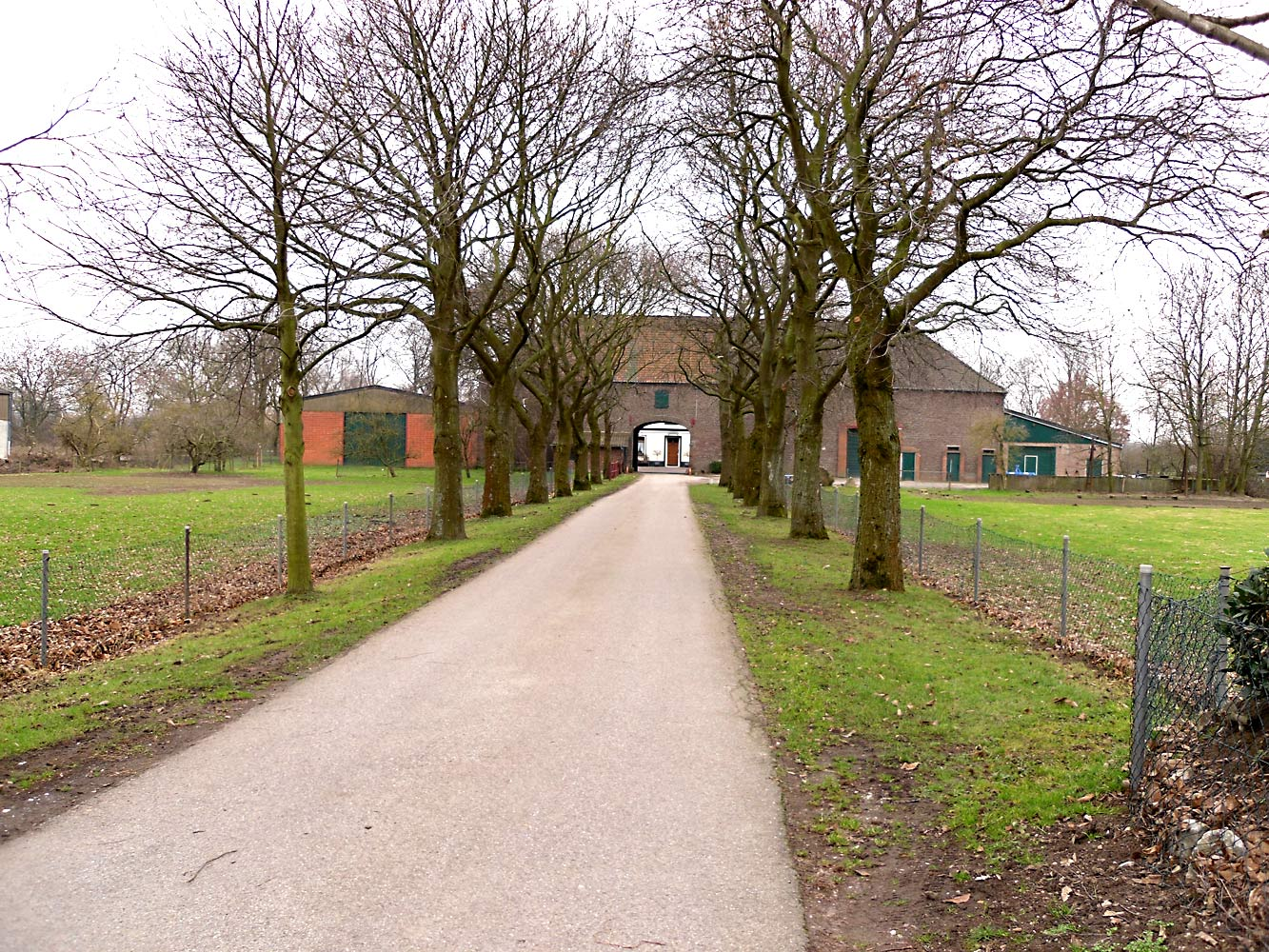 Ilverich zentrum